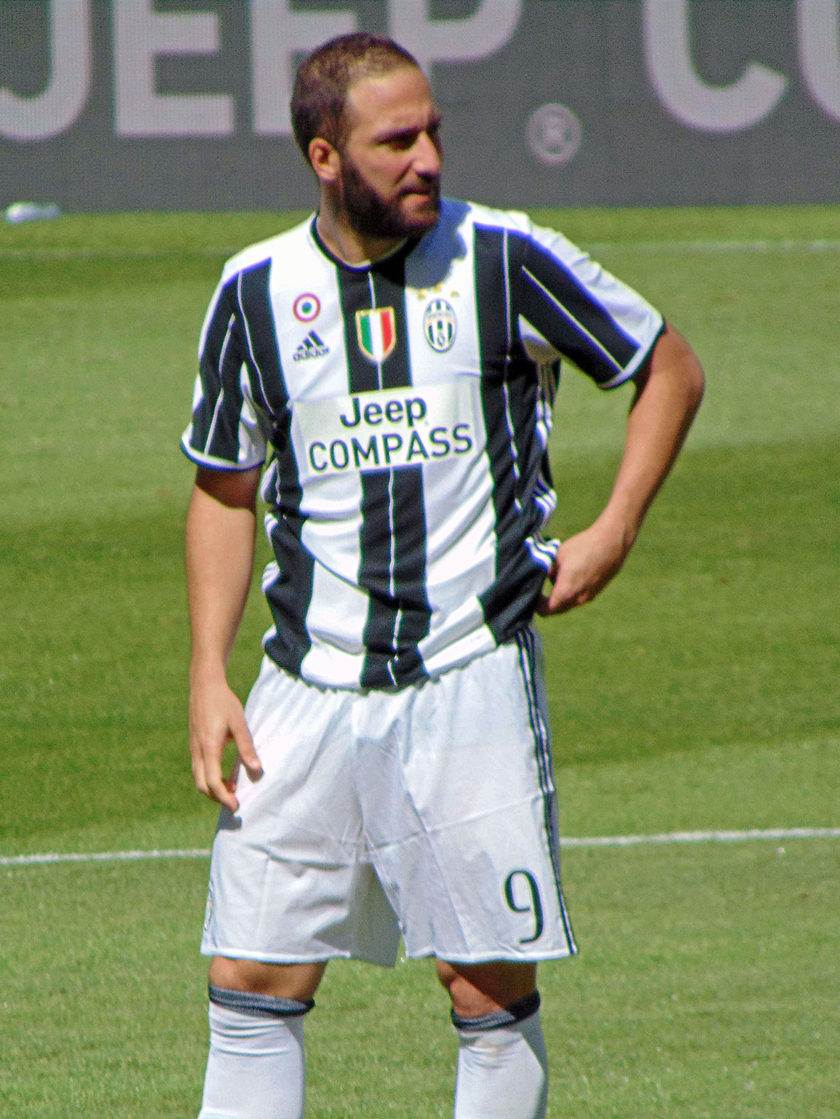 Torino, Juventus Stadium, 21 maggio 2017. Il calciatore della Juventus, Gonzalo Higuaín, nel corso della vittoriosa sfida interna contro il Crotone (3-0) valevole per la 37ª giornata del campionato italiano di Serie A 2016-17.